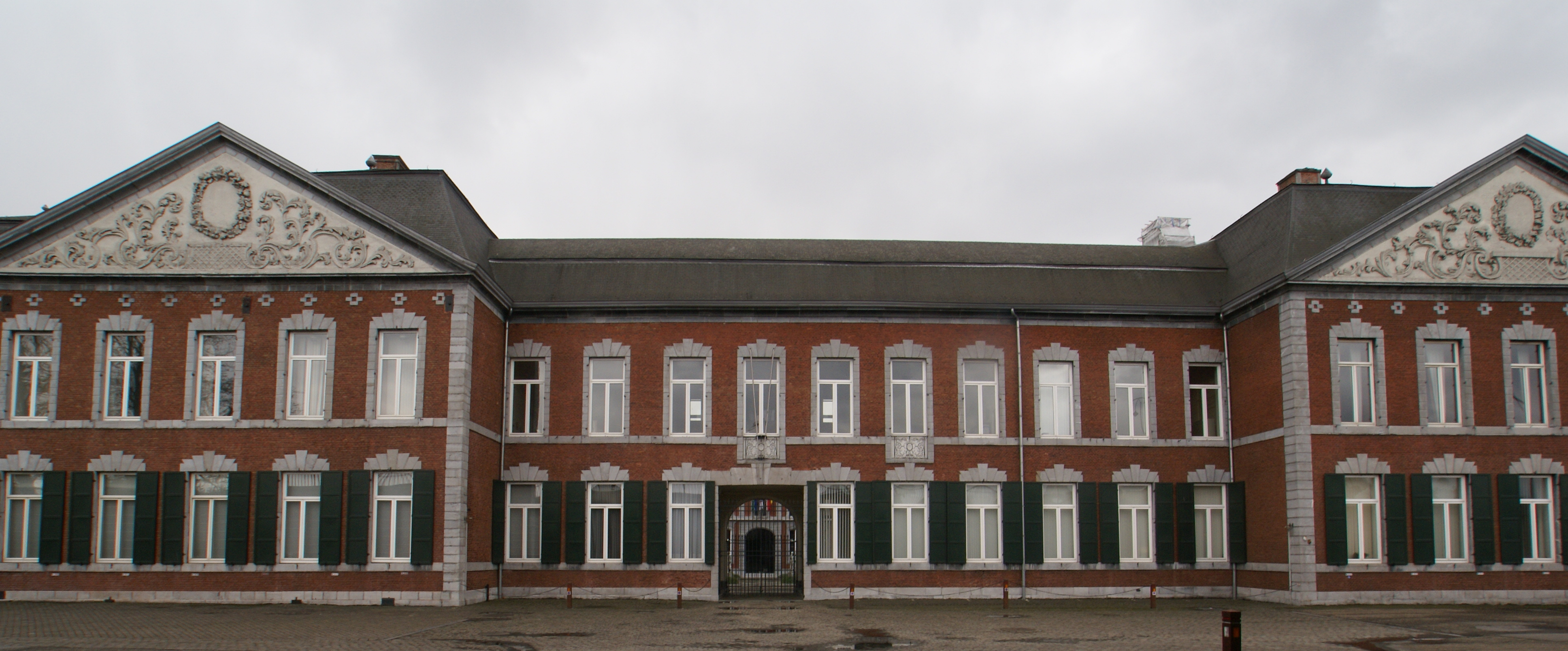 Château Cockerill, Seraing, Belgium